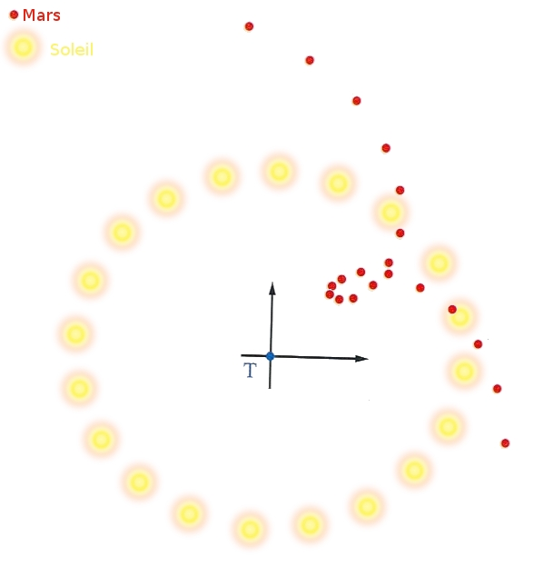 voici une représentation de la rétrogradation de Mars